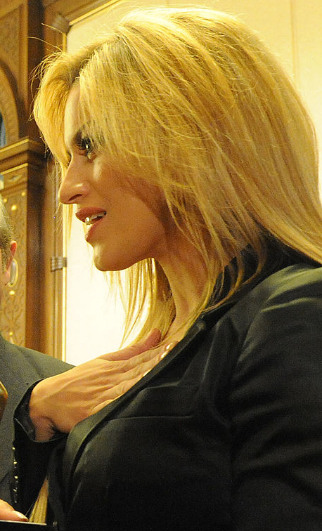 Cantante, modelo y actriz argentina Lola Ponce